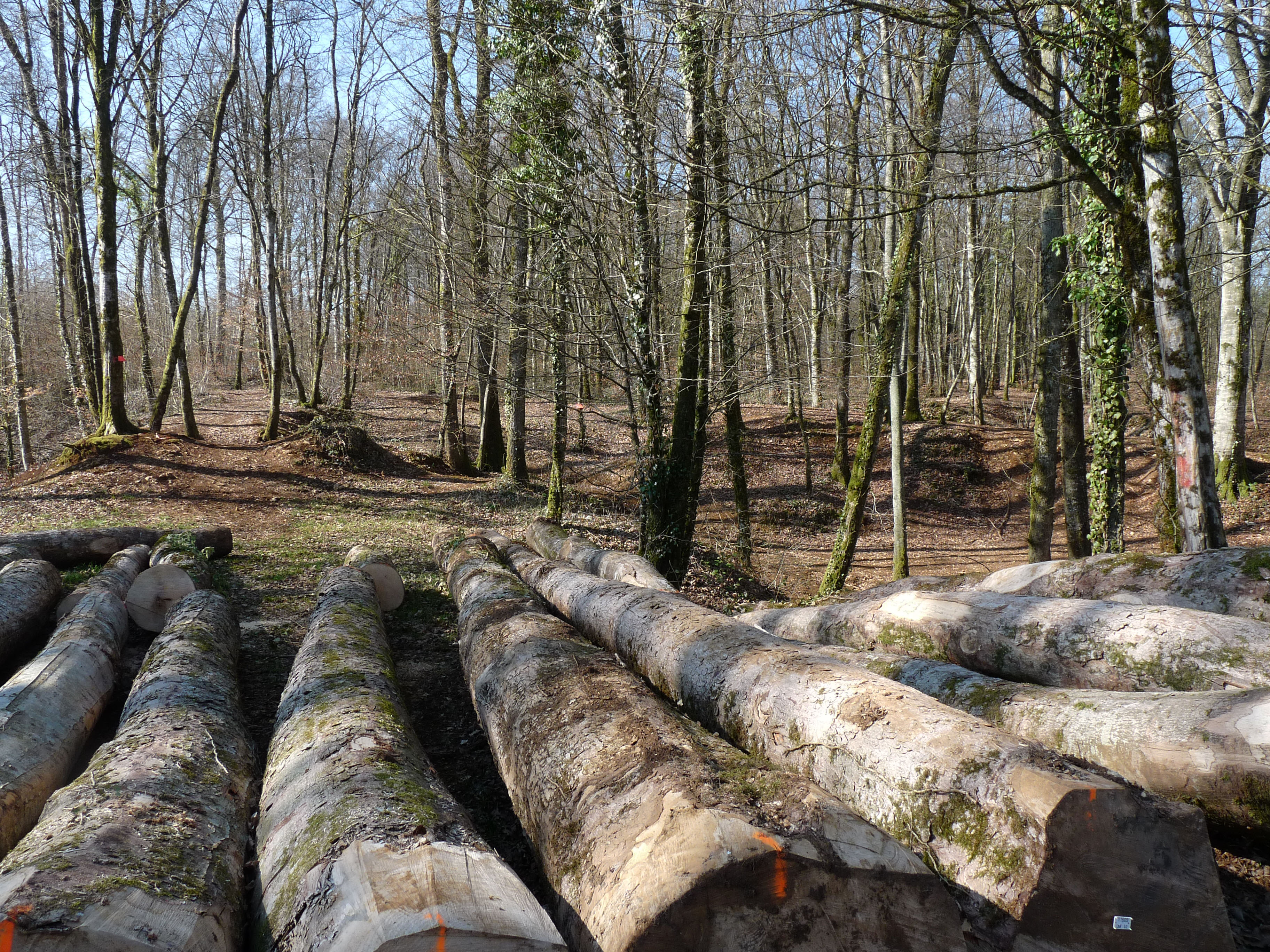 Forêt communale de Montreuil-sur-Thonnance (Haute-Marne)